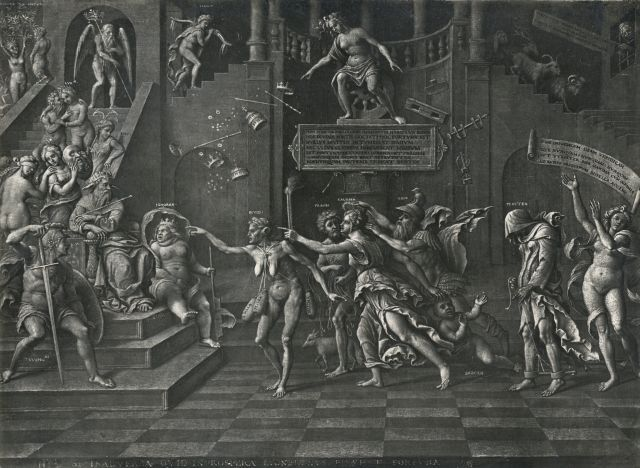 Allegoria della Calunnia, fotografata da Dino Zani (Fondazione Federico Zeri, Bologna)